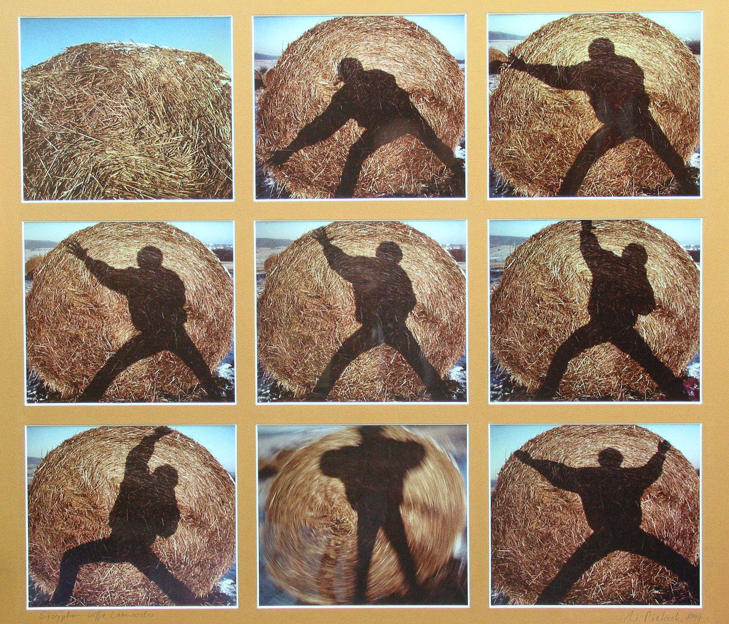 Ein Tableau mit 6 Feldern, die einen Schatten auf Strohballen zeigen